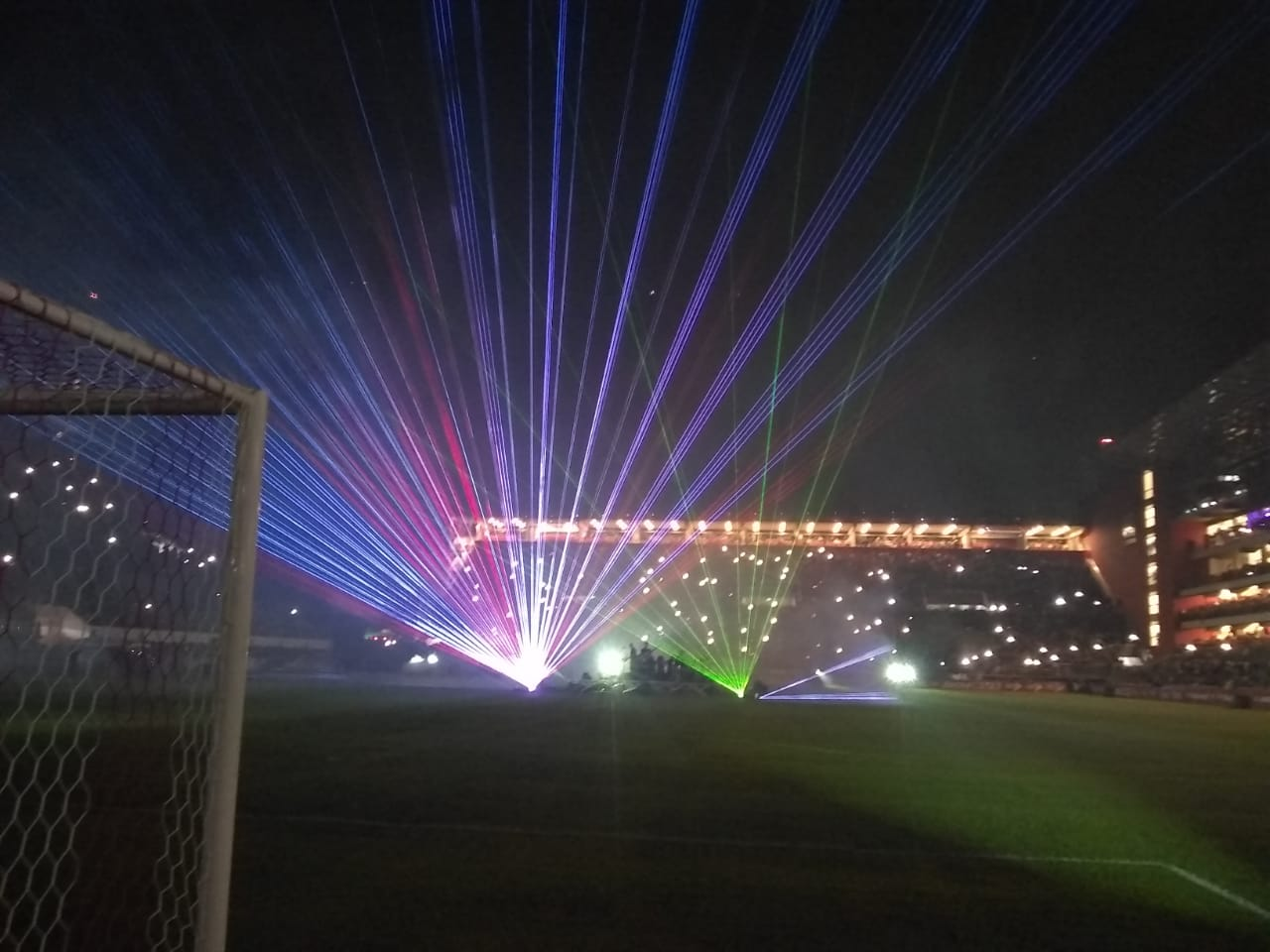 Show de fuegos artificiales durante la reinauguración del Estadio Jorge Luis Hirschi, propiedad del Club Estudiantes de La Plata, el 9 de noviembre de 2019.